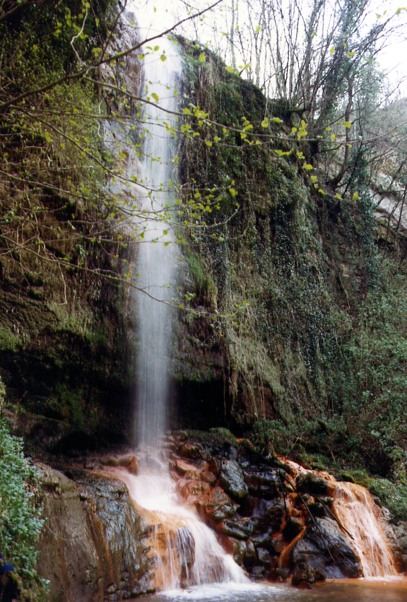 La cascata dell'Infernaccio, tra Celleno e Grotte Santo Stefano